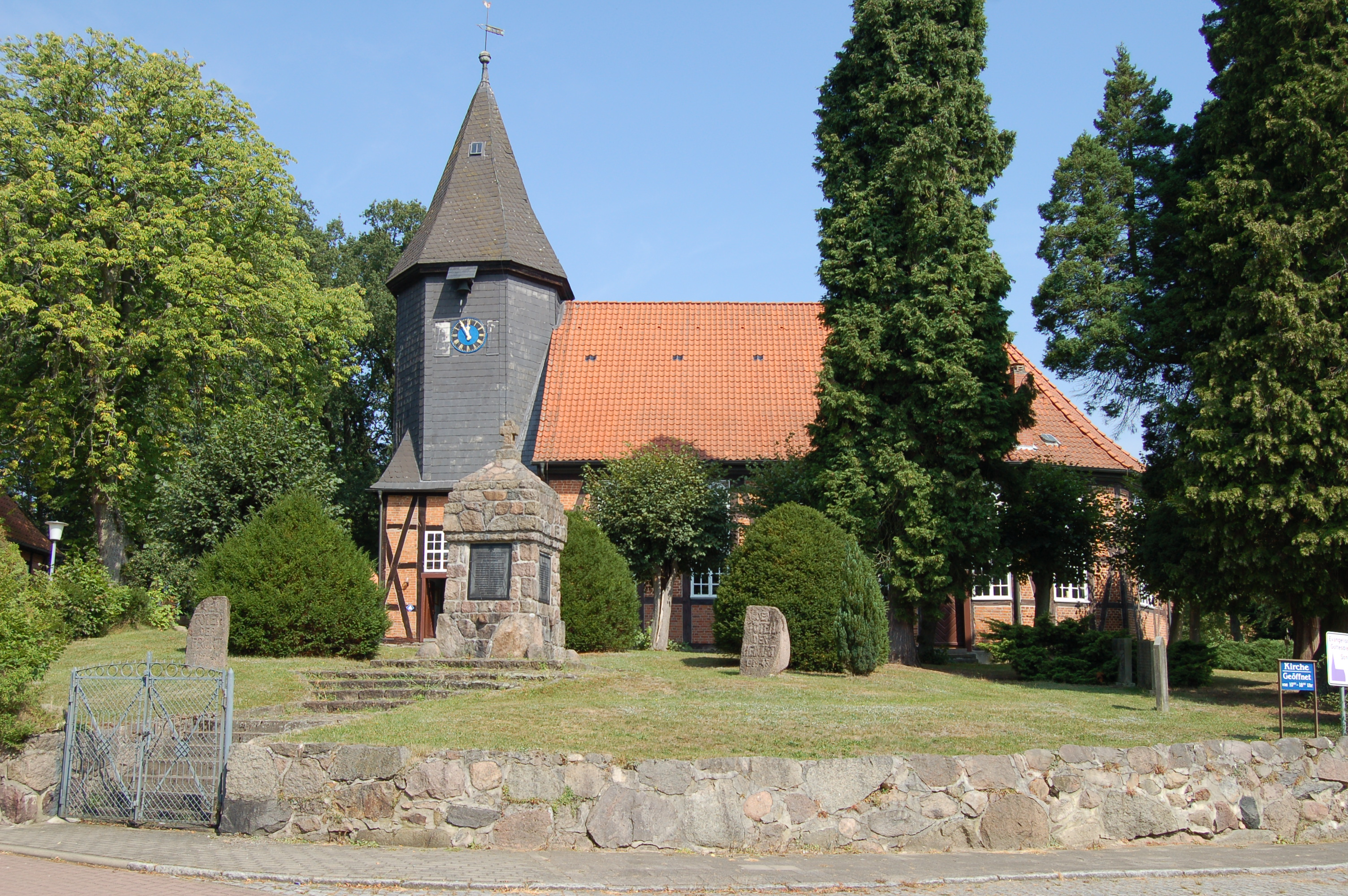 Die Ev.-luth. Kirche Ostenholz aus dem Jahr 1724 im gemeindefreier Bezirk Osterheide im Landkreis Soltau-Fallingbostel